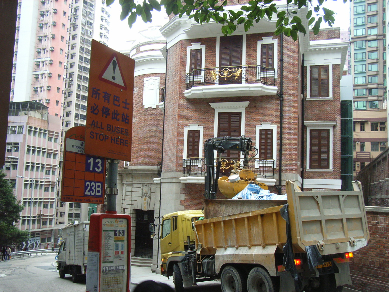 Dr. Sun Yat-sen Museum (Traditional